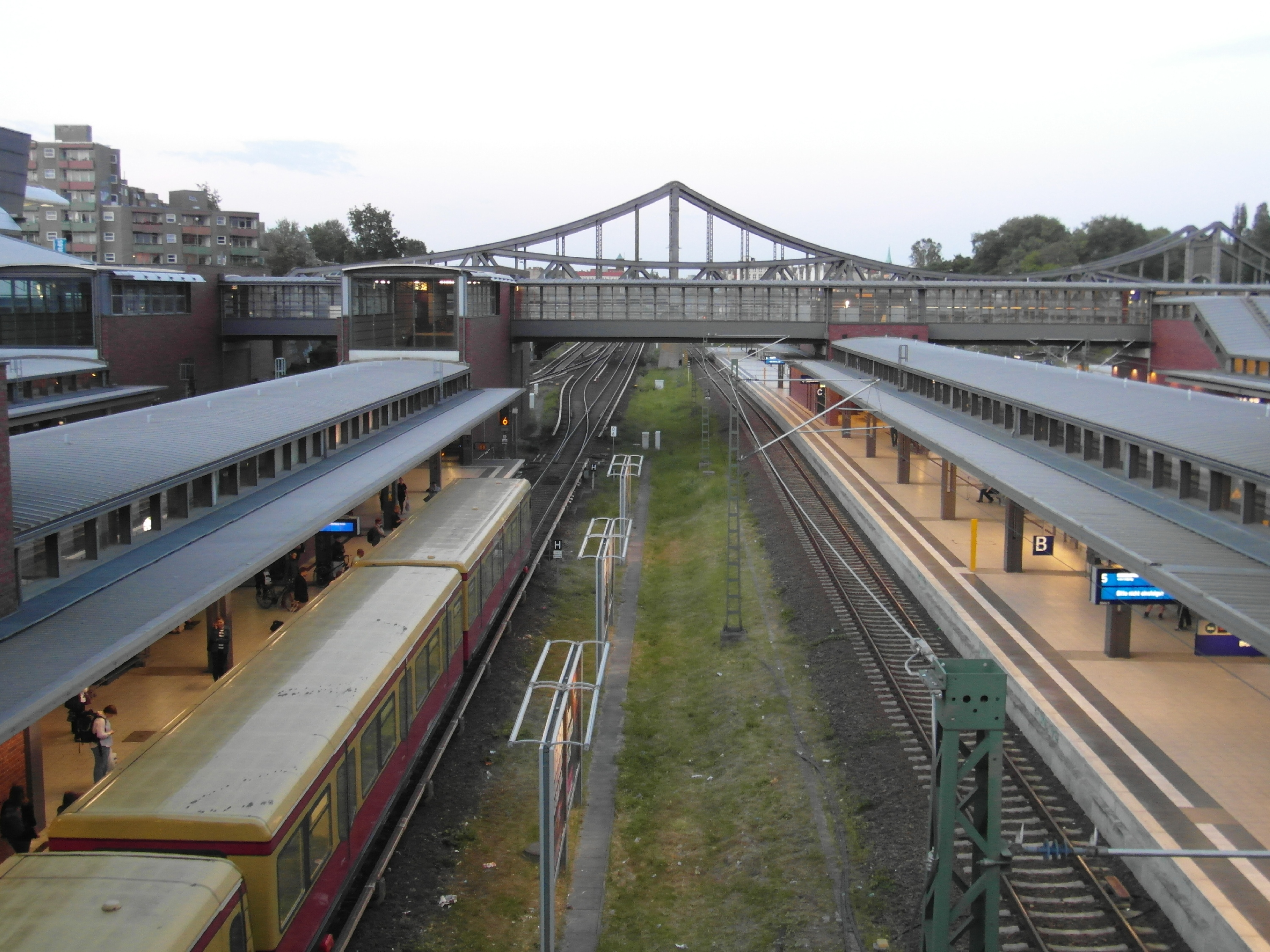 Berlin - Bahnhof Gesundbrunnen